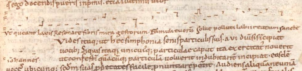 Ausschnitt aus einer Seite der Abschrift des Briefes Guidos von Arezzo an Michael, Mönch in Pomposa: Erste Strophe des Johanneshymnus